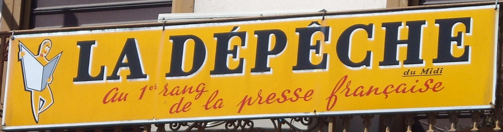 Publicité pour la Dépêche du Midi au dessus d'un café dans l'Ariège (Midi-Pyrénées, France).